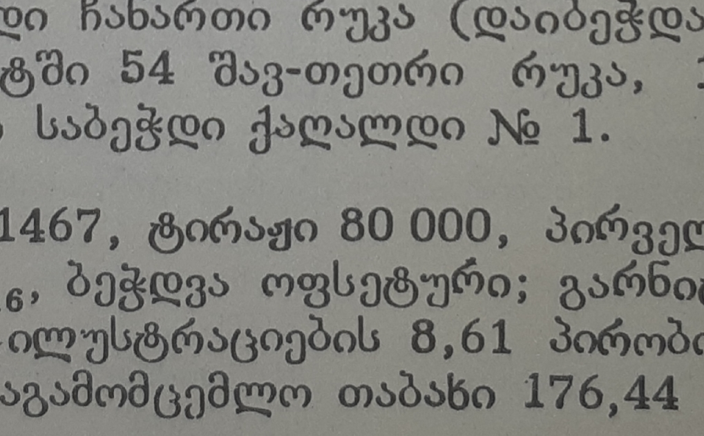 ამონარიდი ქართული საბჭოთა ენციკლოპედიის მე-8 ტომიდან.